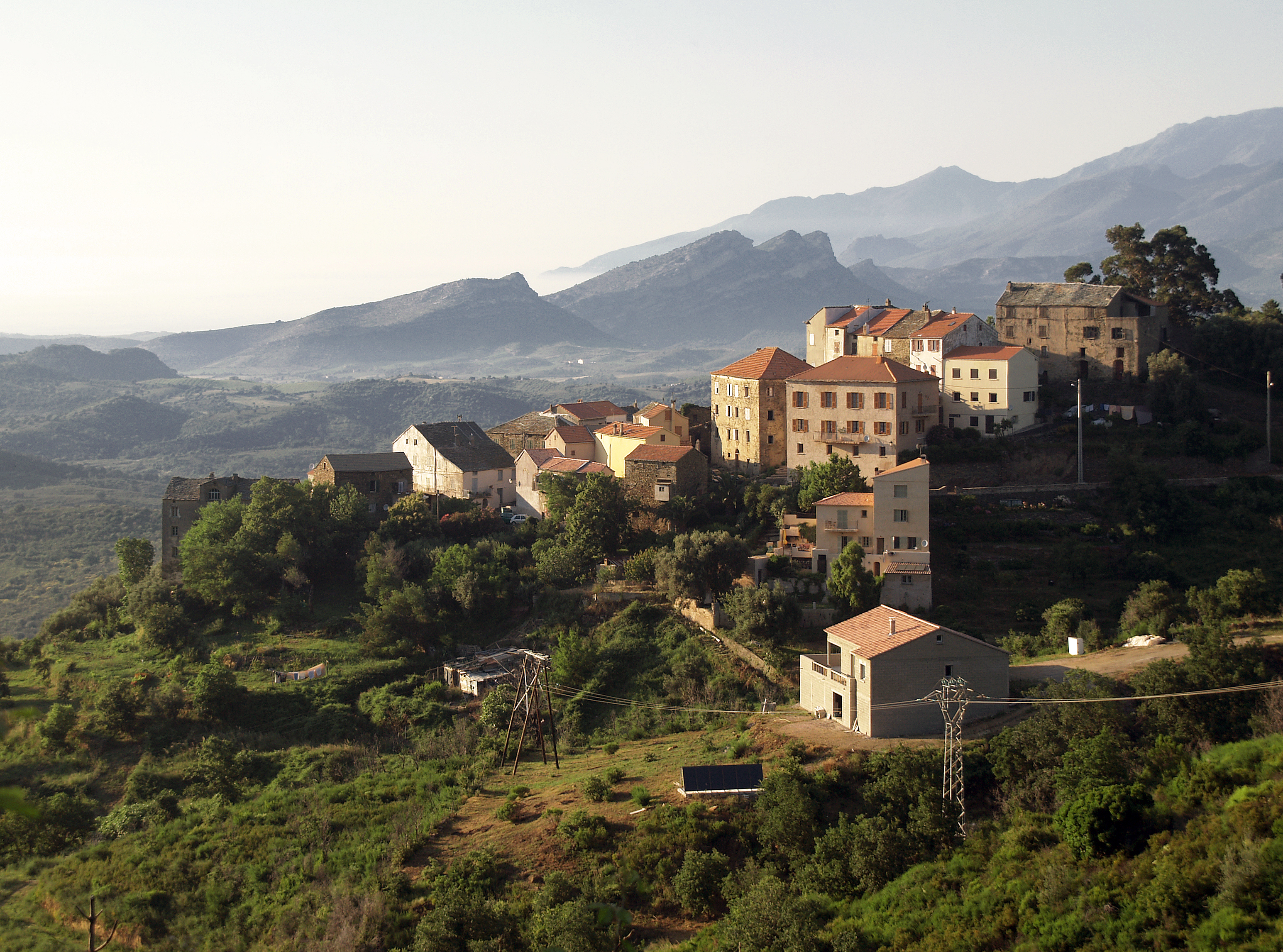 Le village de Vallecalle dans le Haut-Nebbio